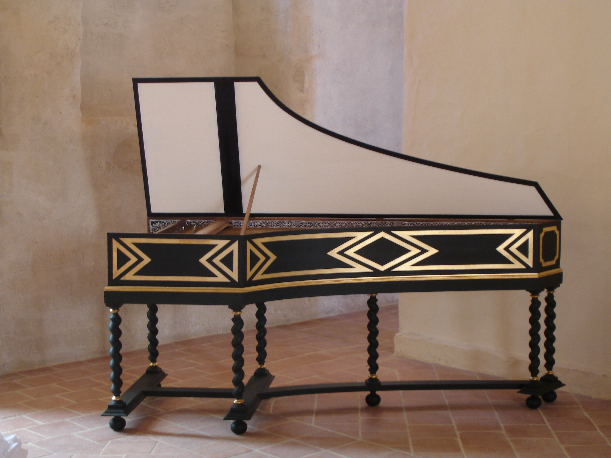 Harpsichord, made by Guillaume Rebinguet-Sudre (4)